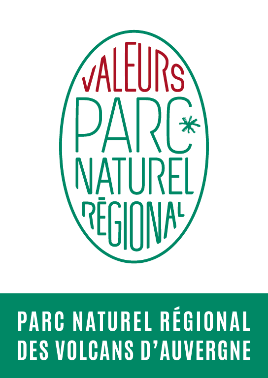 Ce logo atteste de l'attribution de la Marque Valeurs Parc dans le Parc des Volcans d'Auvergne.